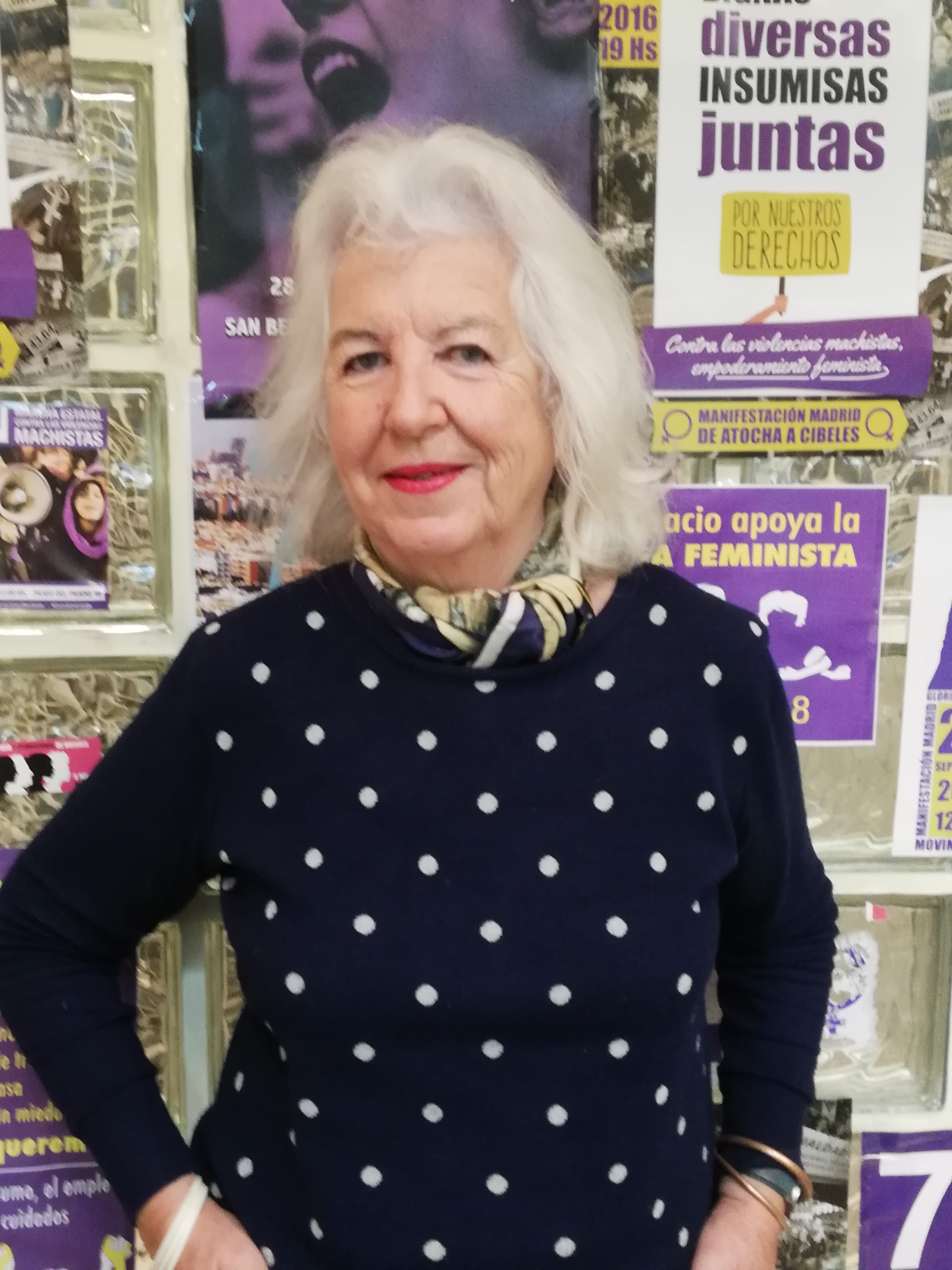 Lucía Mazarrasa Alvear, enfermera jubilada, activista por los derechos humanos y feminista fotografiada el 16 de noviembre de 2018 en una reunión en la sede feminista de la Calle Bravo Murillo número 4 de Madrid, España.